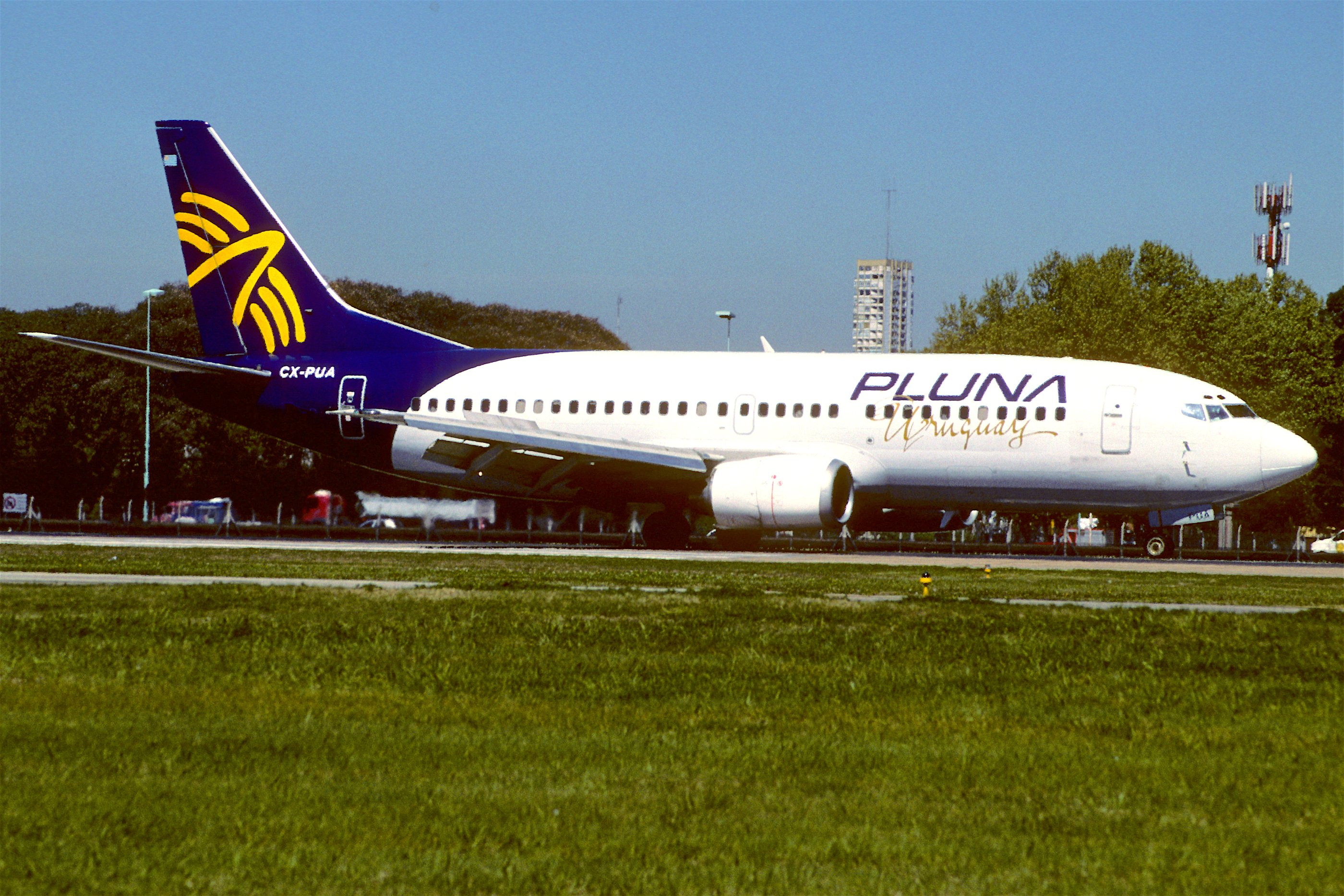 320dz - PLUNA Uruguay Boeing 737-3Q8; CX-PUA@AEP;23.09.2004